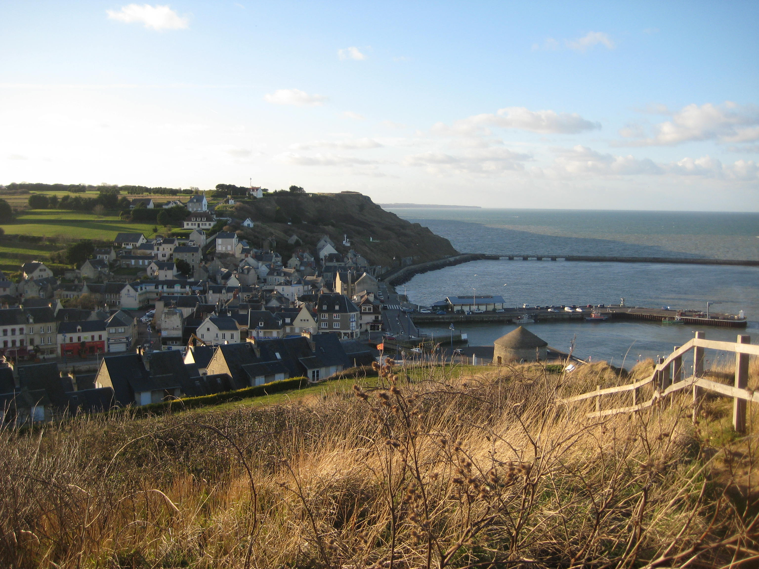 Une vue de Port-en-Bessin-Huppain, prise depuis les hauteurs au dessus de la Tour Vauban.